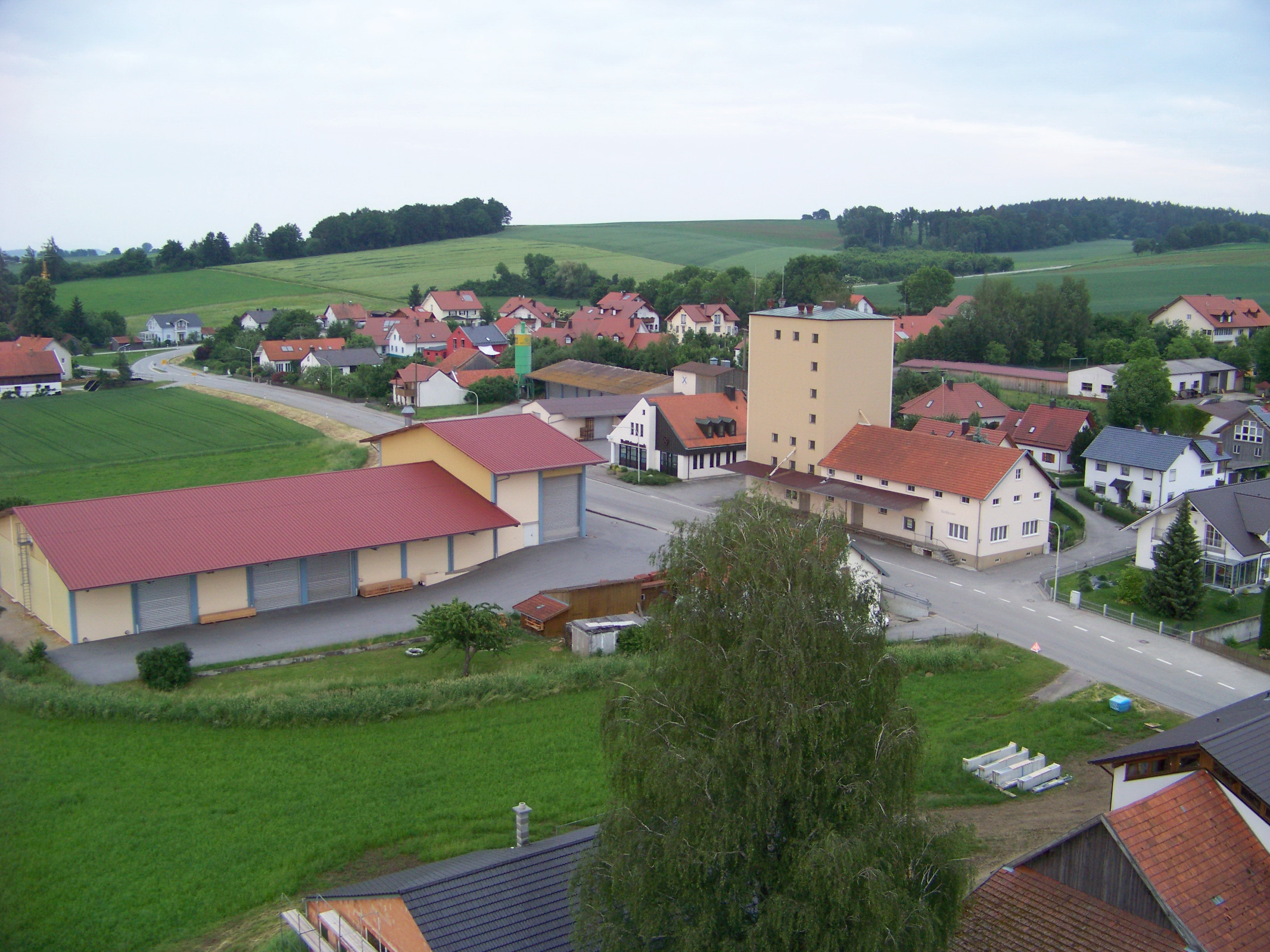 Laberweinting, Hofkirchen. Blick über Hofkirchen nach Nordosten über das Raiffeisengelände zur Siedlung in der Petersleite.